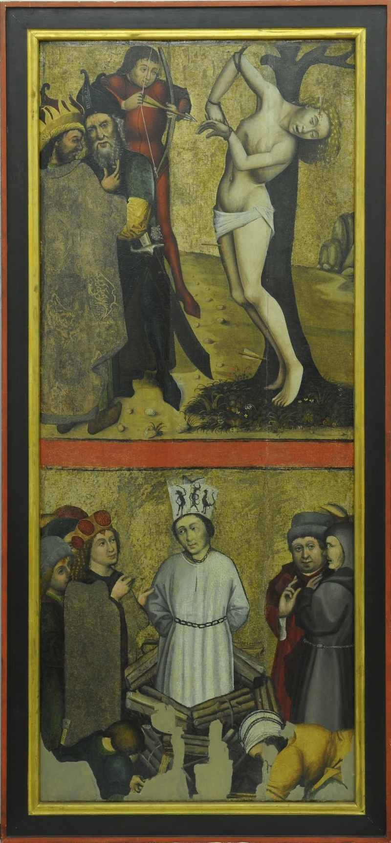 Pravé křídlo deskového oltáře z Roudník (vnitřní strana). Dolní část křídla s vyobrazením Upálení mistra Jana Husa. V horní části zobrazeno Umučení sv. Šebestiána.